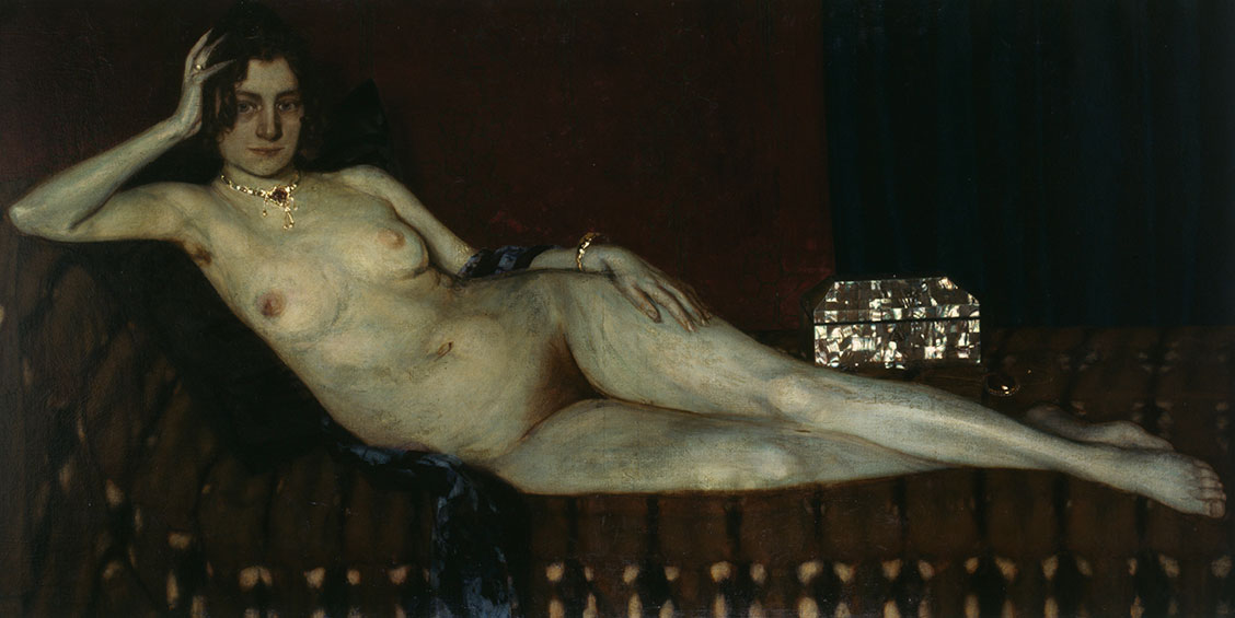 Gold und Perlmutter, Hamsterfelldecke